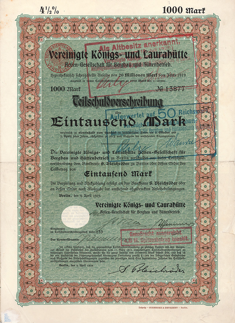 Teilschuldverschreibung über 1000 Mark der Vereinigten Königs- und Laurahütte AG vom 4. April 1919